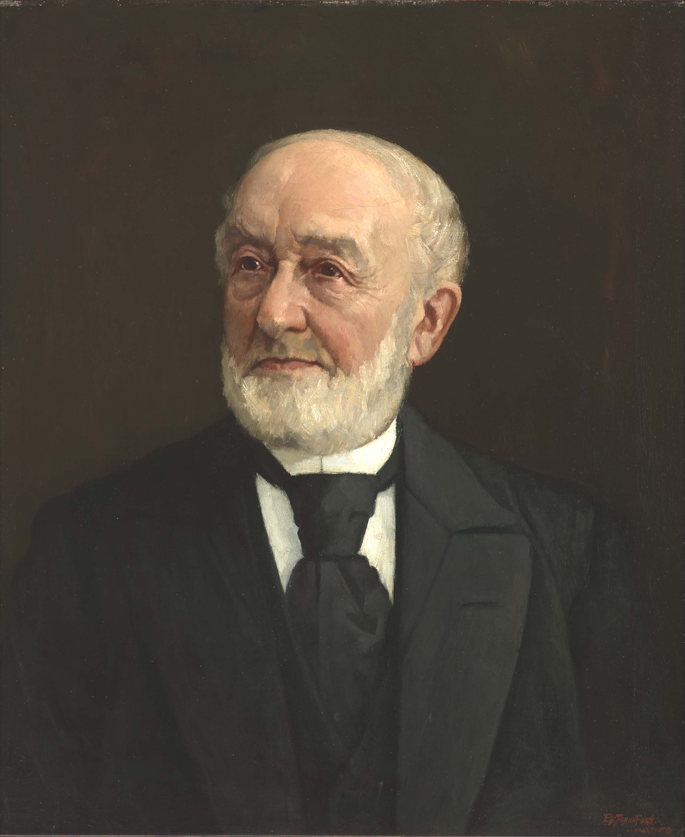 Portret van Simon van den Bergh door Eduard Frankfort